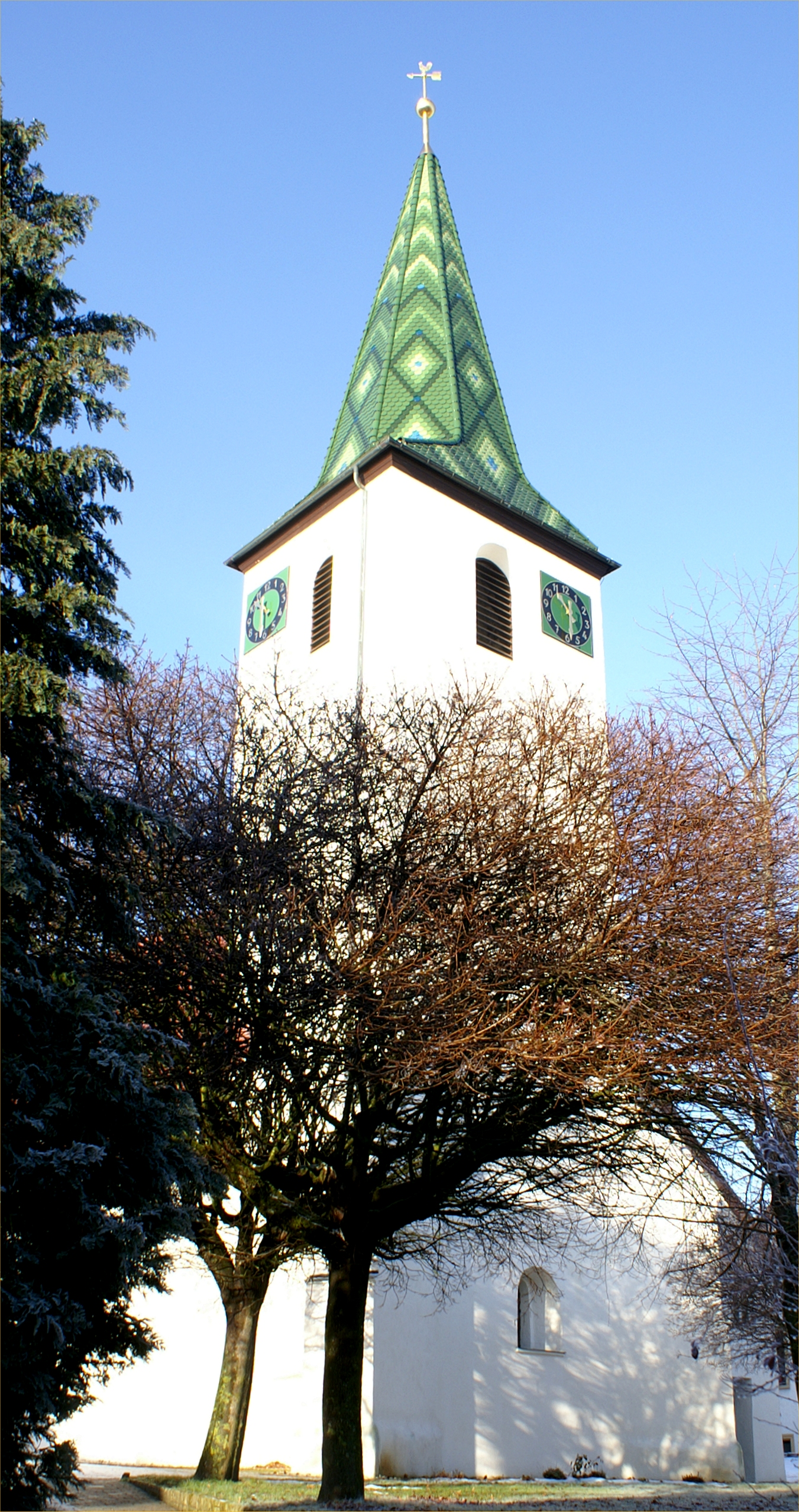 Liebfrauenkirche in Machtolsheim im Alb-Donau-Kreis